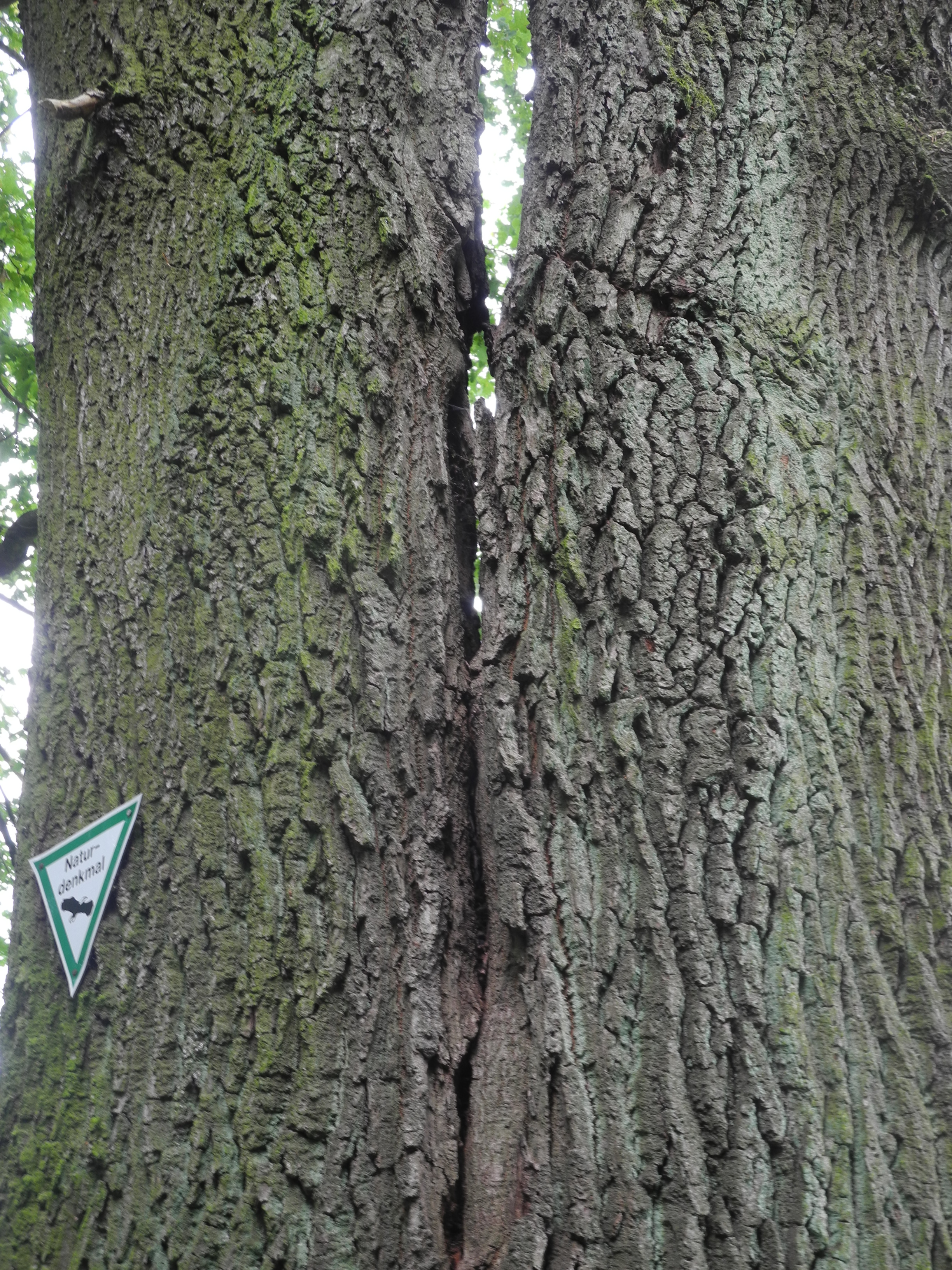 Naturdenkmal im Landkreis Kassel 6.33.432. Stieleiche (Quercus robur) als einer der 2 Bäume südlich von Niederkaufungen.